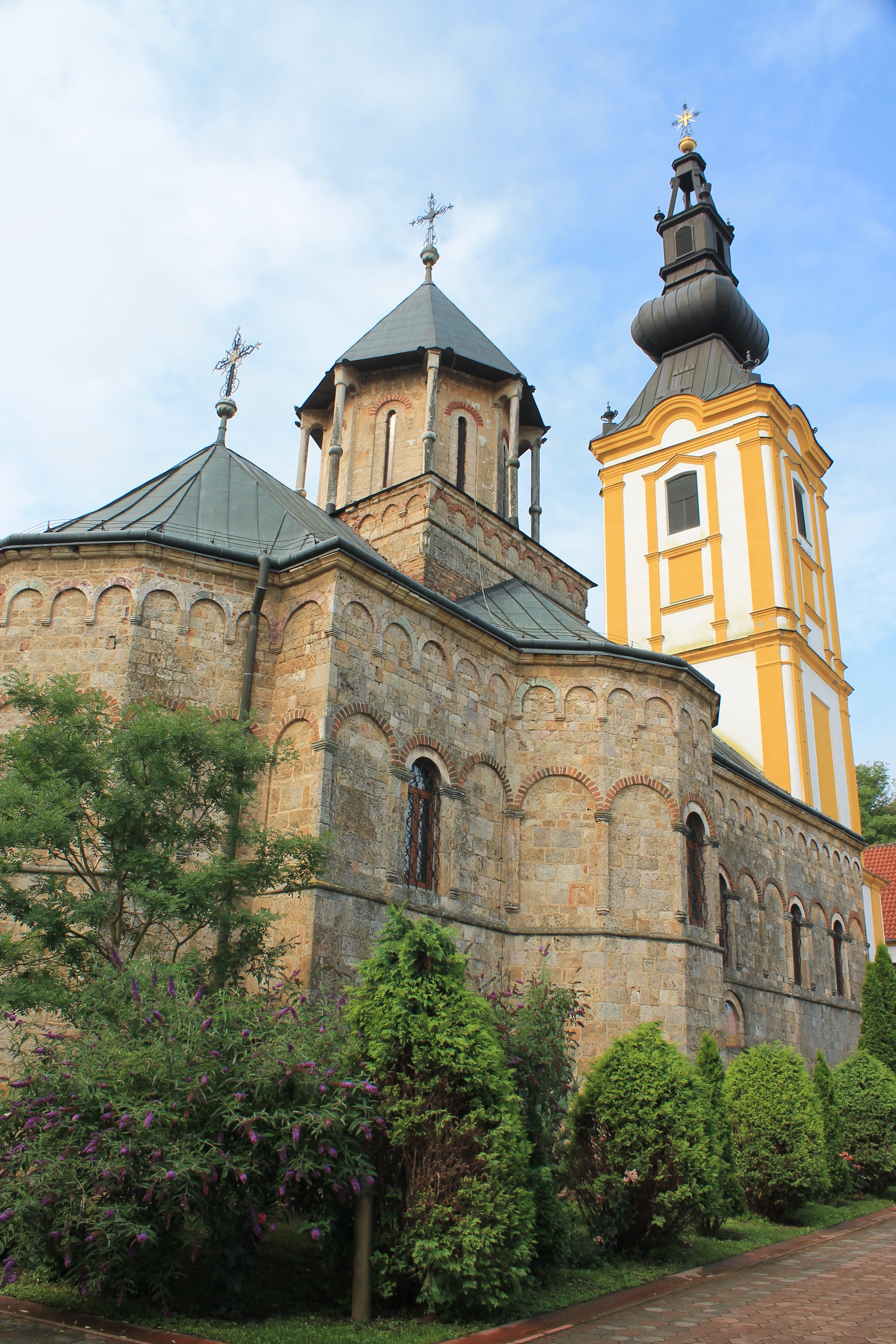 Manastir Privina Glava